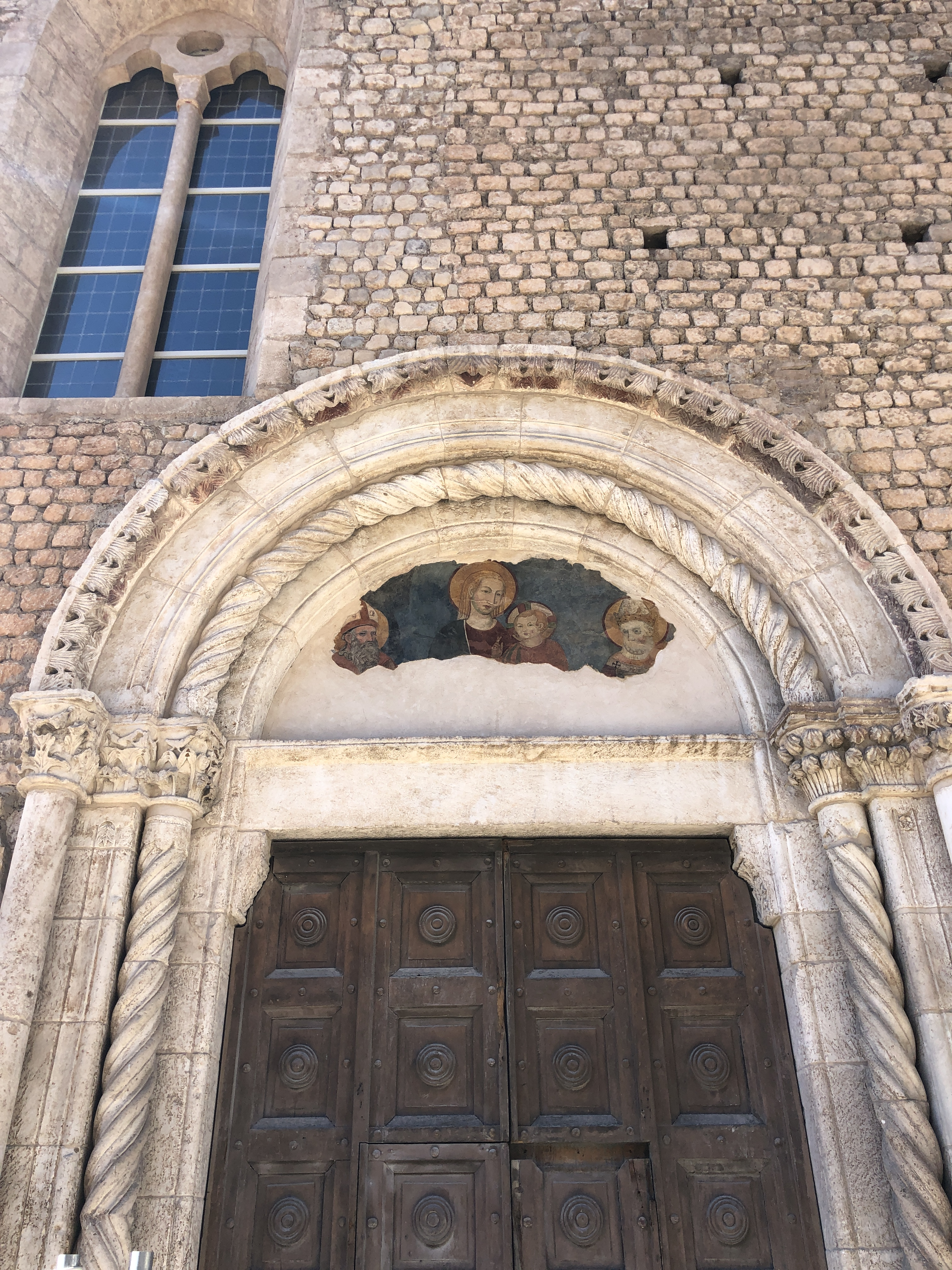 Portale dell'ingresso laterale a destra dell'abbazia di San Silvestro in L'Aquila.